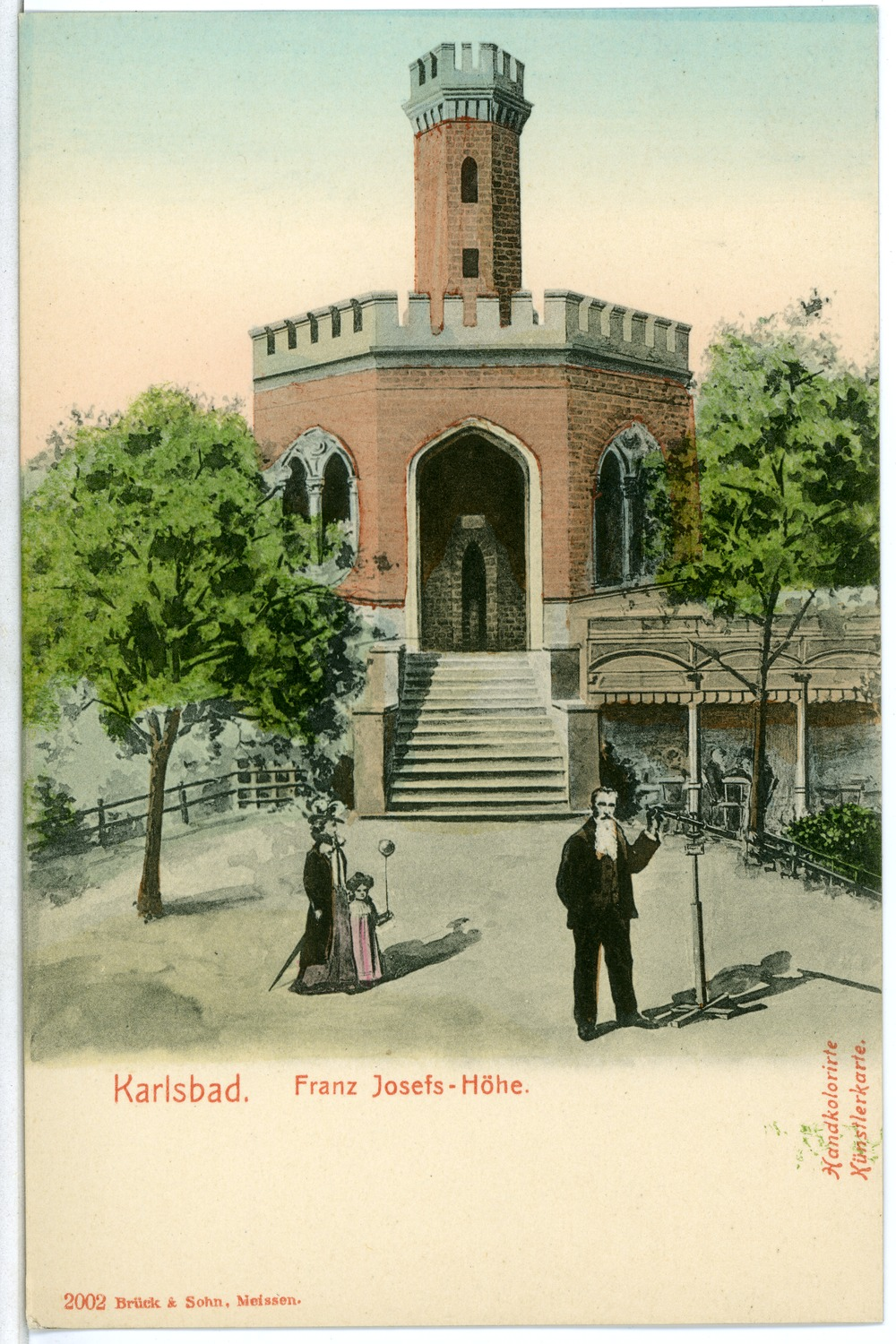 Karlsbad; Franz Josephs Höhe This postcard is from publisher Brück & Sohn in Meißen ( This postcard has a unique number 02002 and is available in a higher resolution at the publisher. This images was uploaded in a cooperation project between Wikipedians and the publisher.